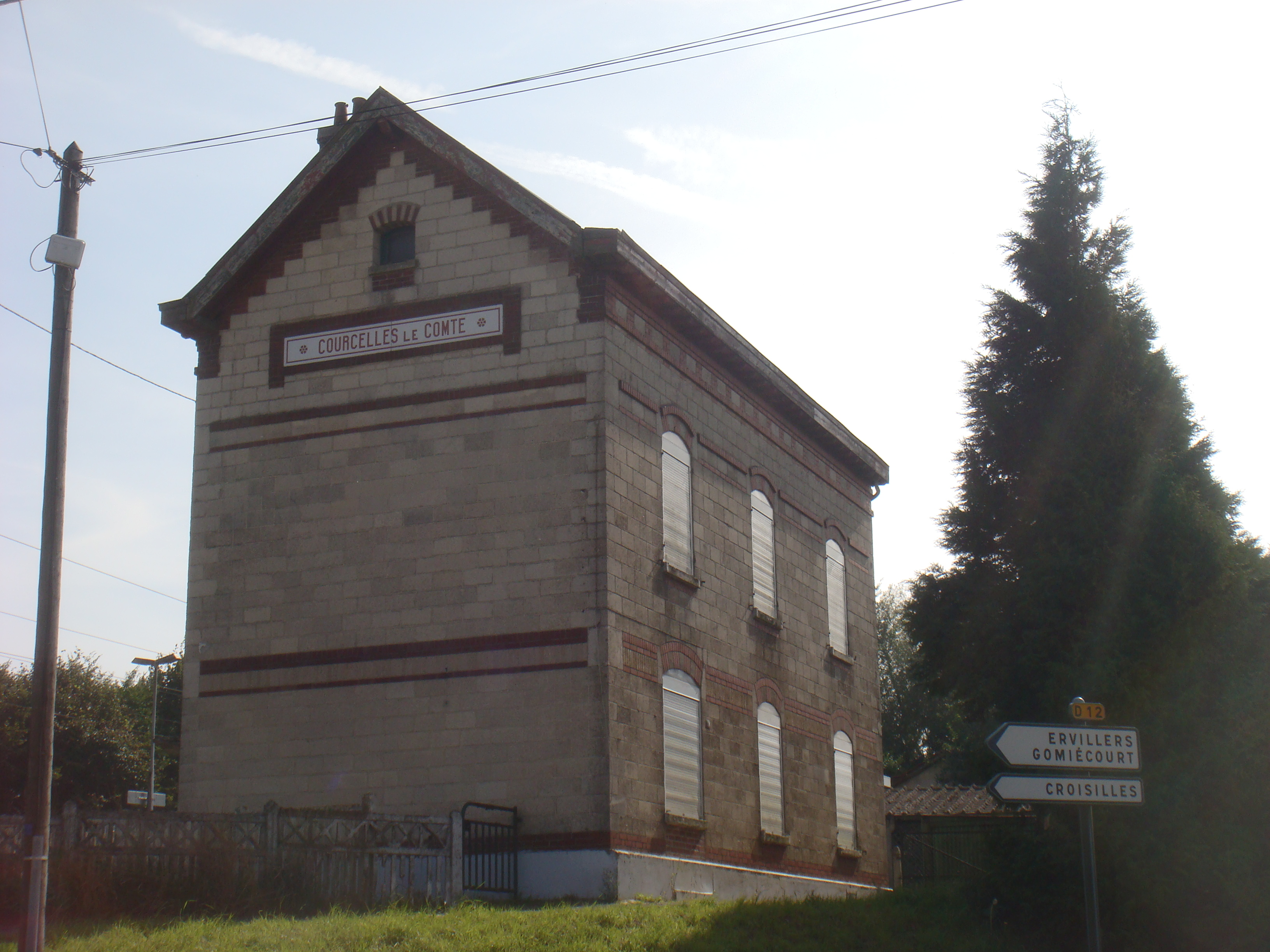 Gare de Courcelles-le-Comte, Pas-de-Calais, France